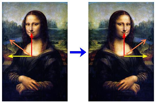 《蒙娜丽莎》以及其左右翻转的图像